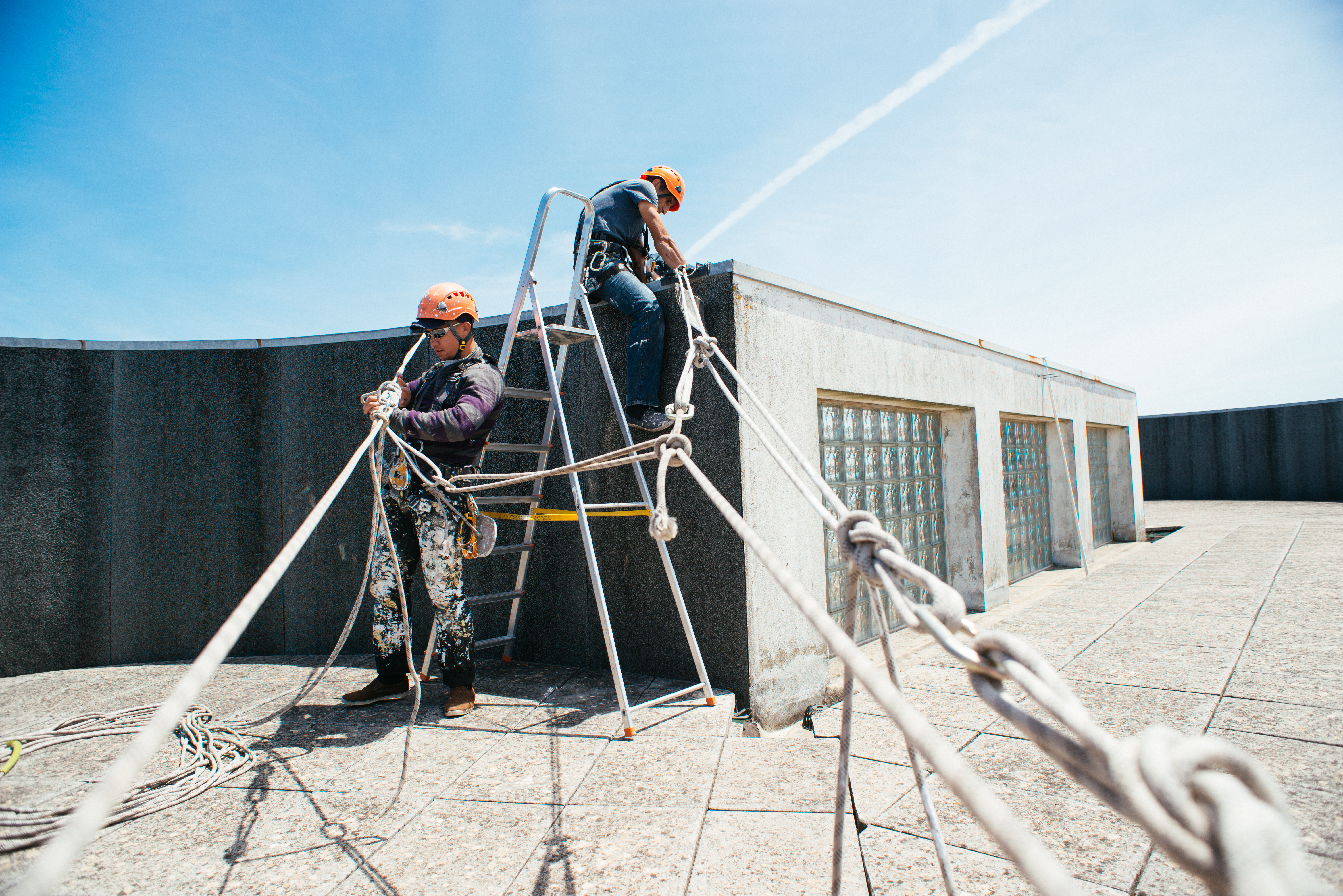 Trabalhadores a fixar as cordas de alpinismo para iniciar a descida